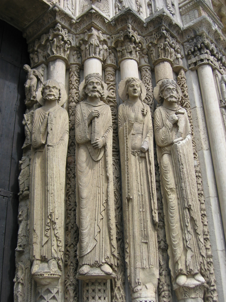 Portail central du porche occidental de la cathédrale de Chartres